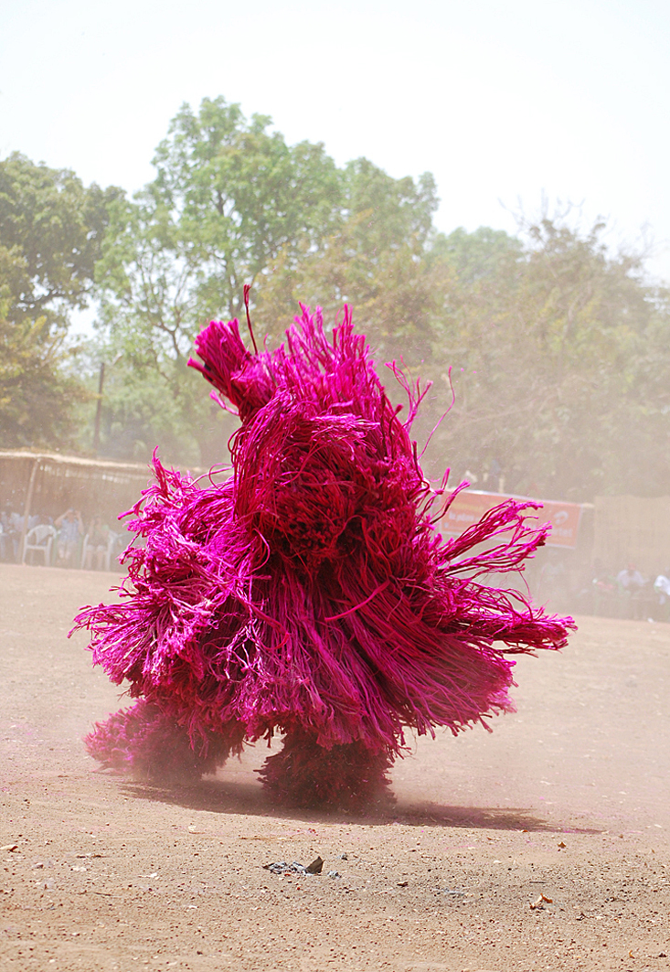 Danse des masques lors du festival des Masques(FESTIMA) à Dédougou This is an image of music and dance from Burkina Faso